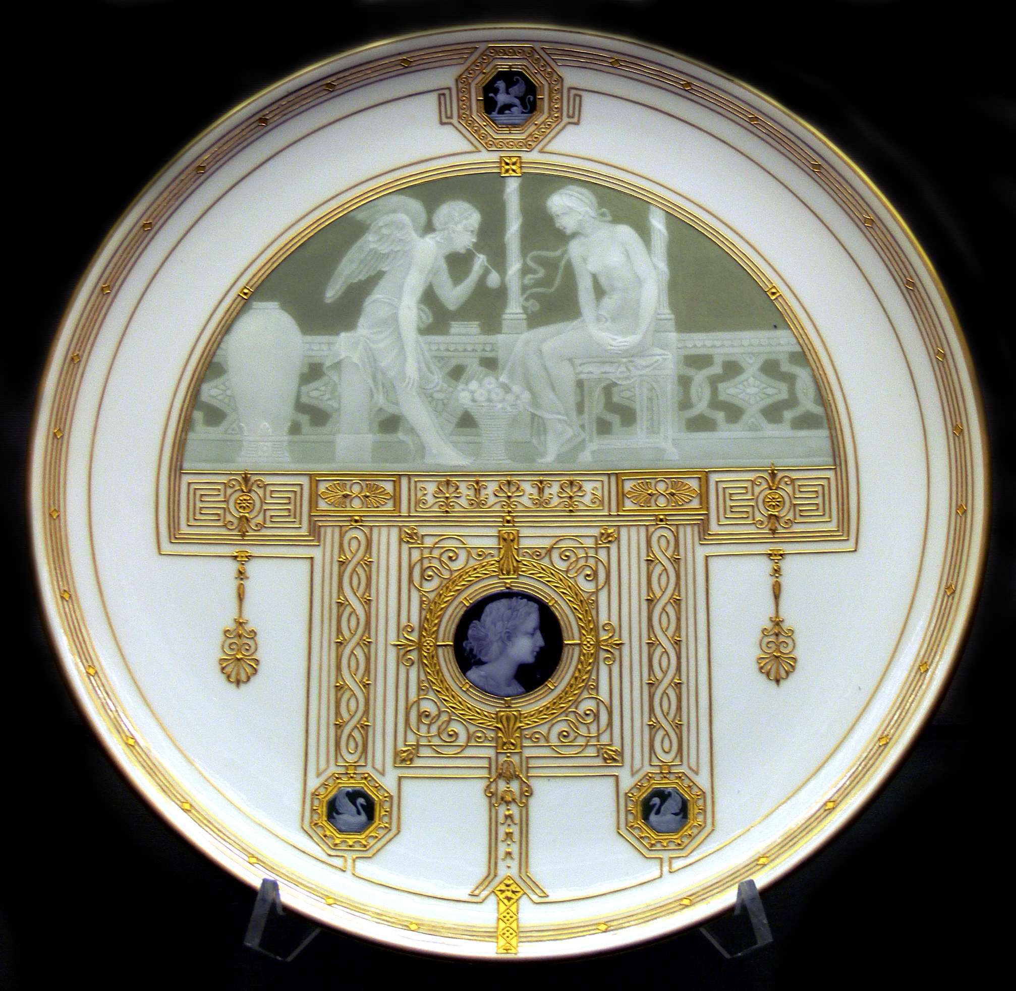 Zierteller mit antikisierender Darstellung, Königliche Porzellan-Manufaktur Berlin, um 1900, Porzellan mit pâte-sur-pâte-Dekor Kunstgewerbemuseum Berlin, Inv. Nr. W-1979,13